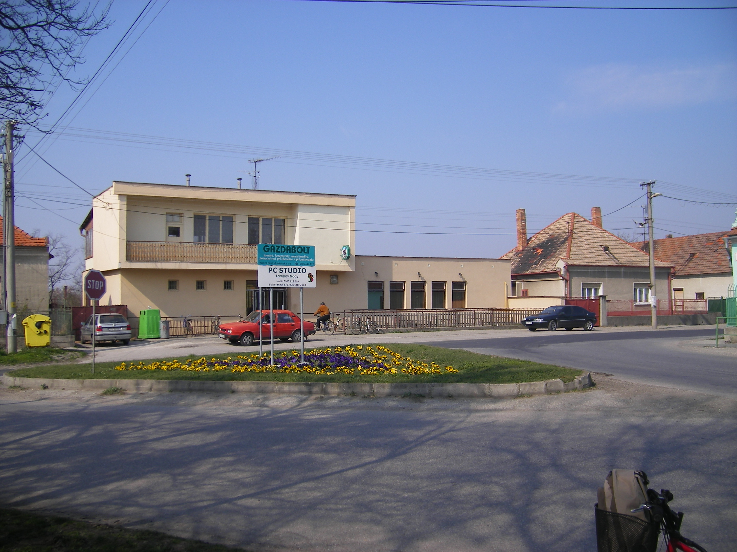 Ekecs - Laki út és Fő utca kereszteződés